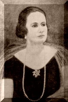 Sara Solá de Castellanos